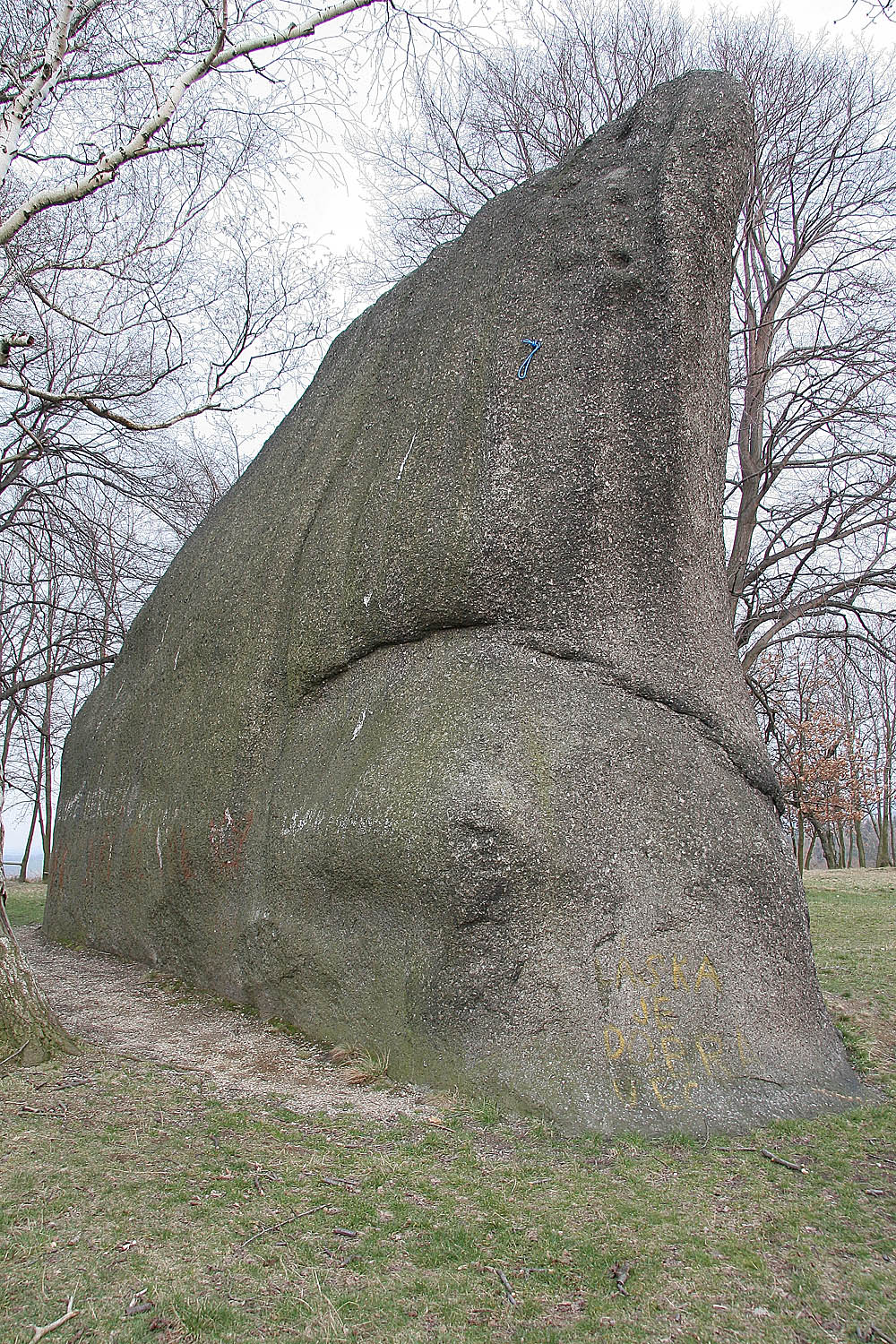 Přírodní památka Klepec - kamenný útvar Slouha